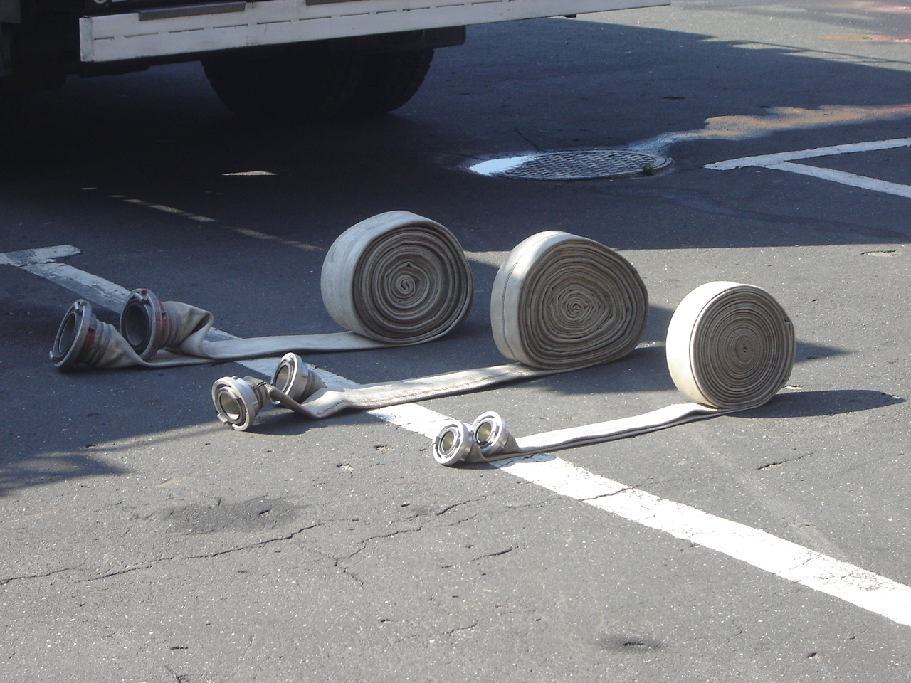 Węże standaryzowane o długości 20 m: W52, W75, W110 (cyfra oznacza średnicę w mm)